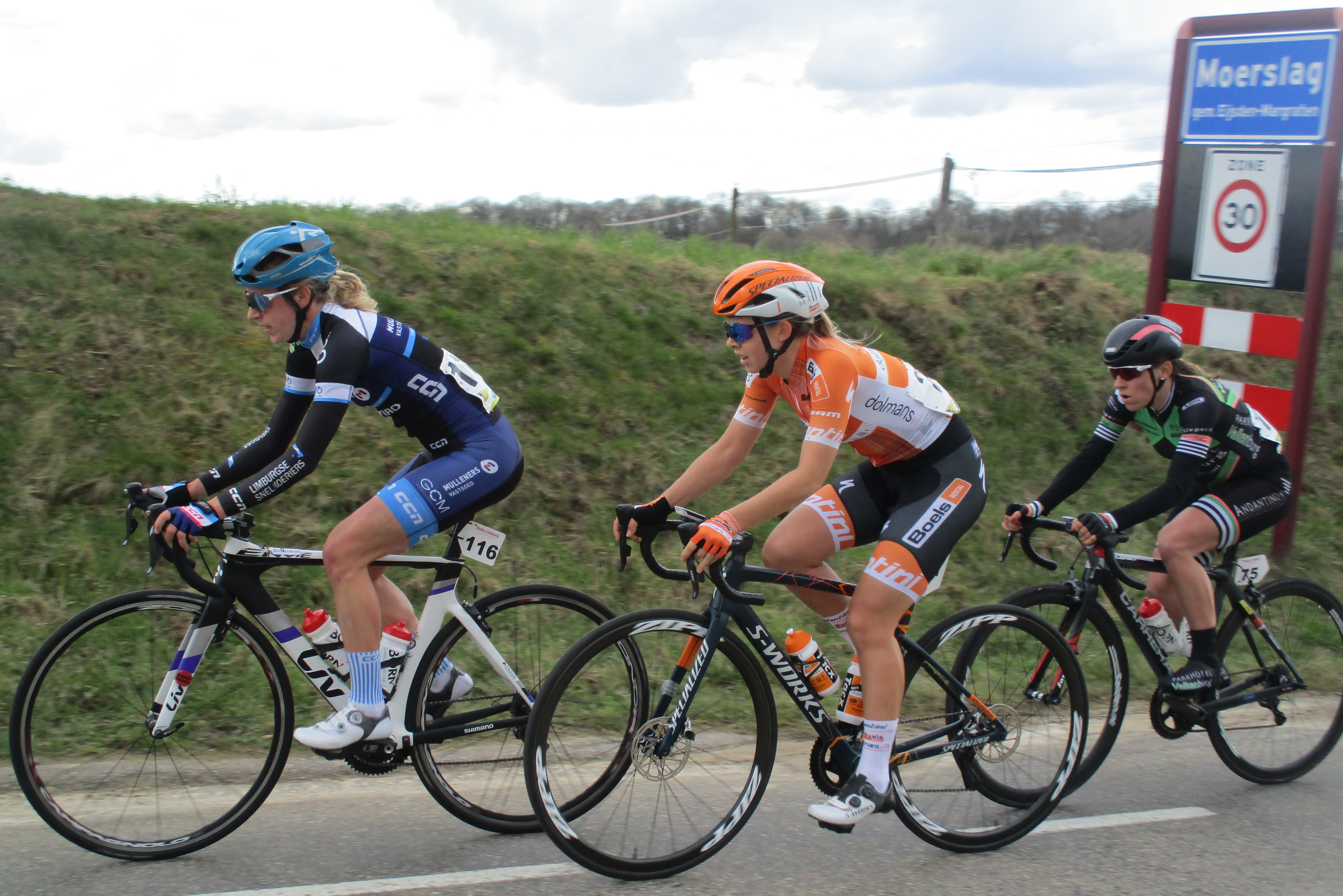 Beklimming van Moerslag in de Volta Limburg Classic voor vrouwen 2018